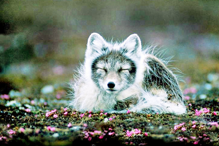 Fjellrev,arctic fox,alopex lagopus.